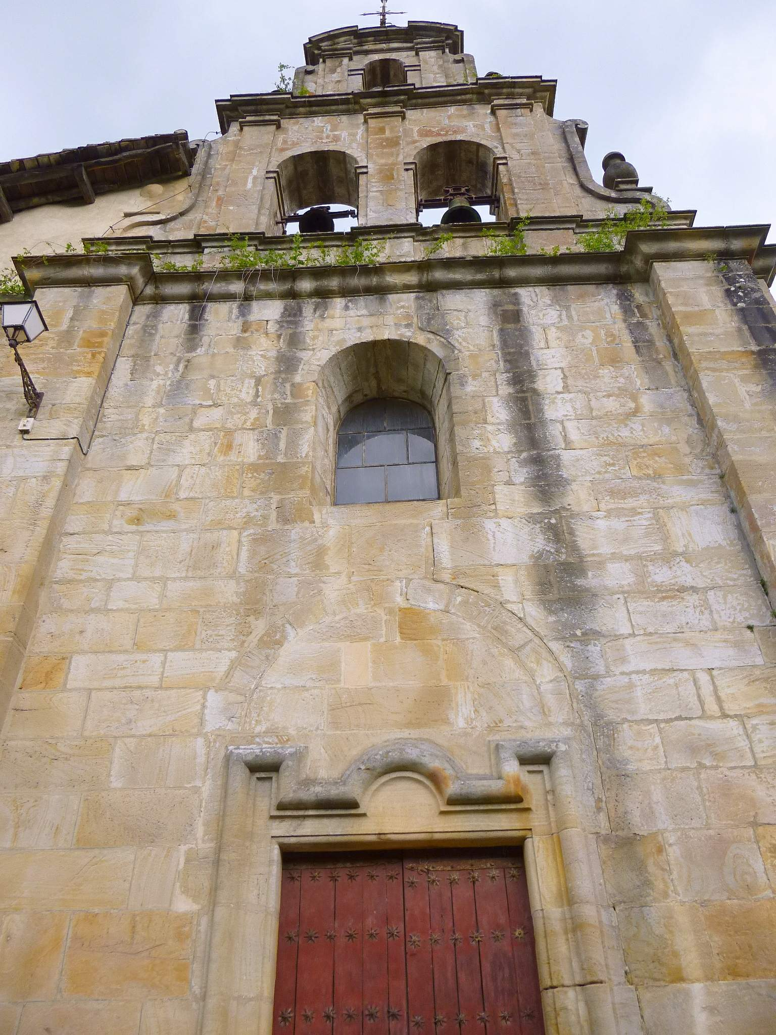 Santuario de Santa María de Dorleta, en Salinas de Léniz (Leintz-Gatzaga), Gipuzkoa